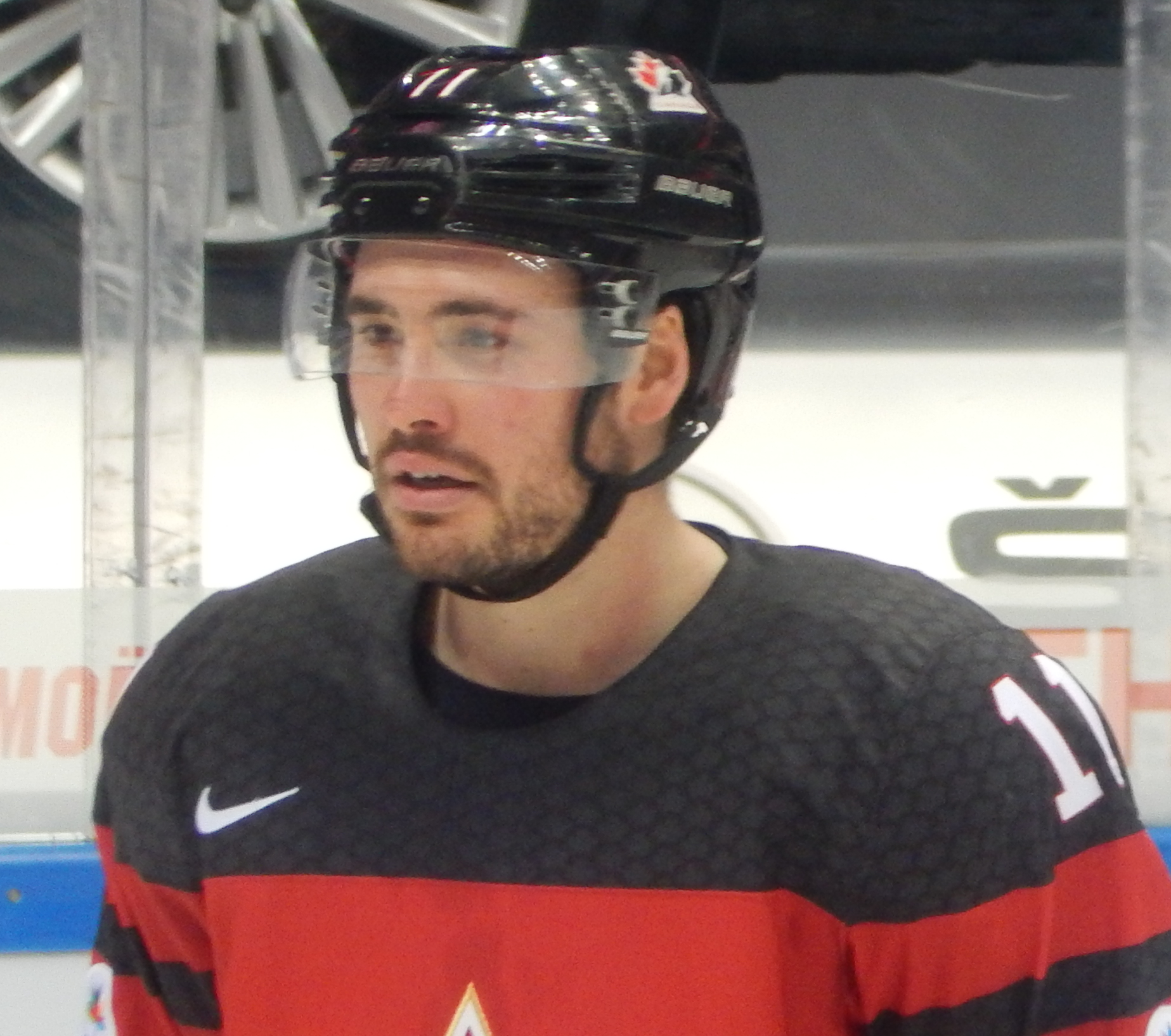 Кубок Первого Канала 2017, матч Канада - Южная Корея (13 декабря 2017) 8 WOLSKI,Wojtek (CAN) 11 11 BACK,Taylor (CAN)